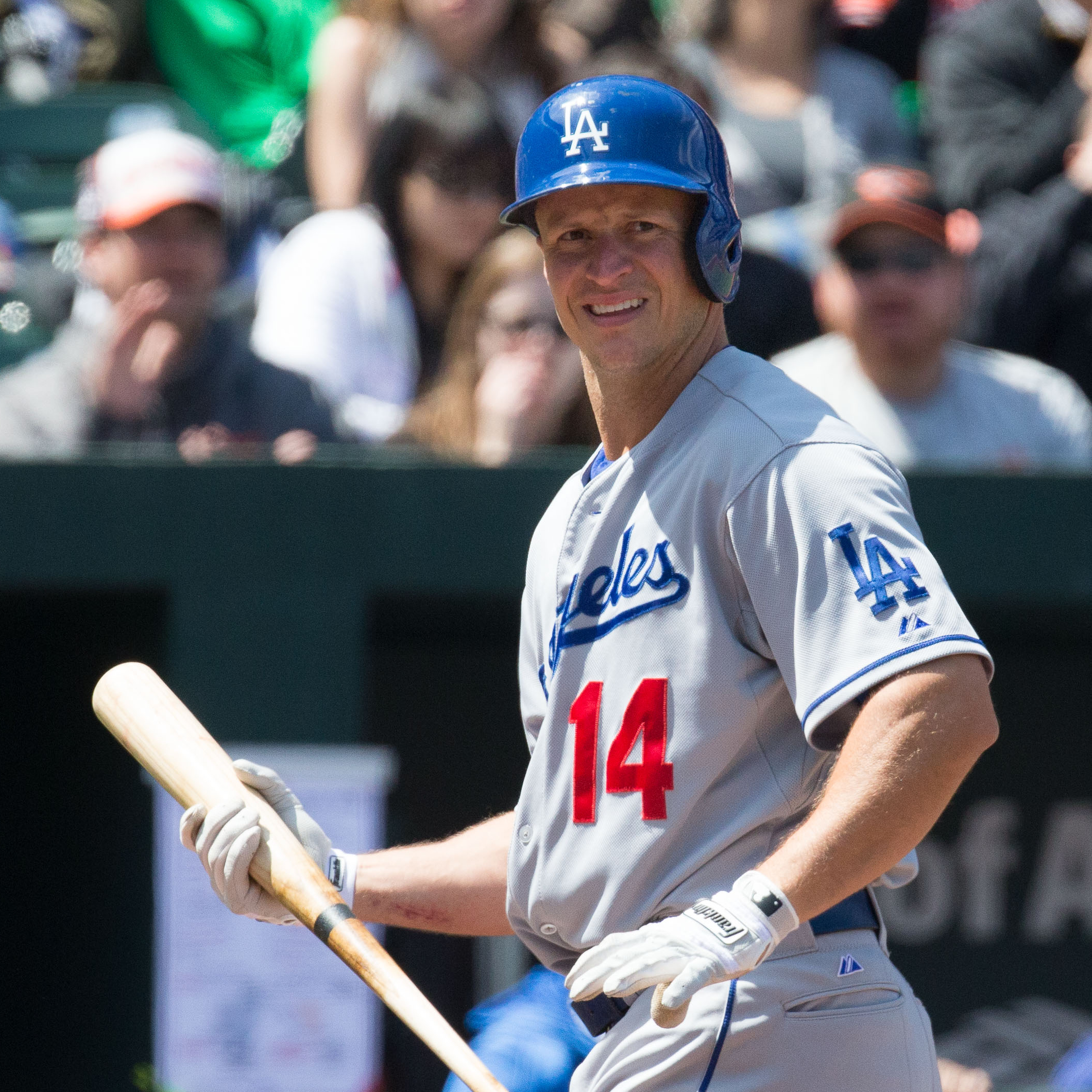 Mark Ellis